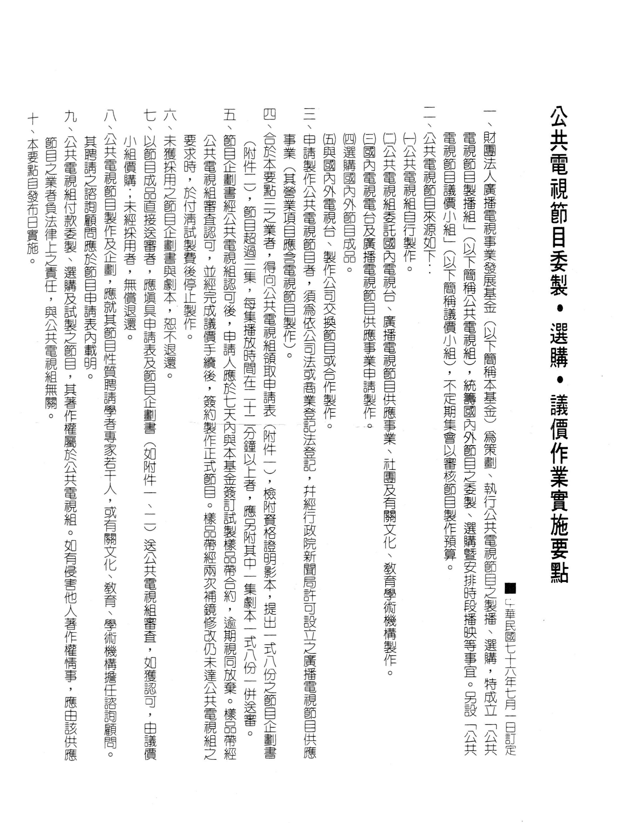 中文（台灣）: 1987年7月1日，財團法人廣播電視事業發展基金訂定的《公共電視節目委製、選購、議價作業實施要點》。